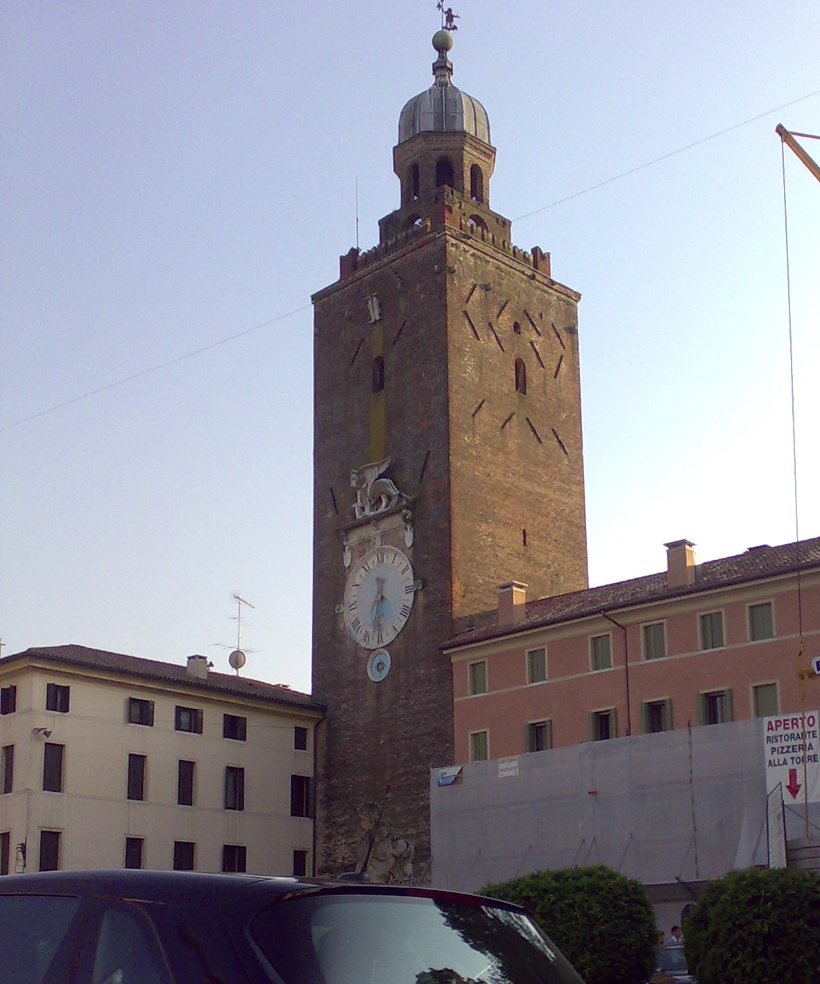 Castelfranco Veneto: La torre est del castello